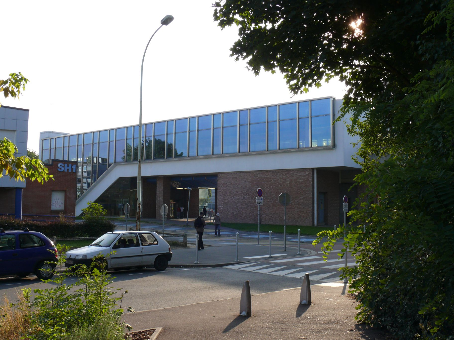 Station Cité Scientifique - Professeur Gabillard de la ligne 1 du métro de Lille Métropole.